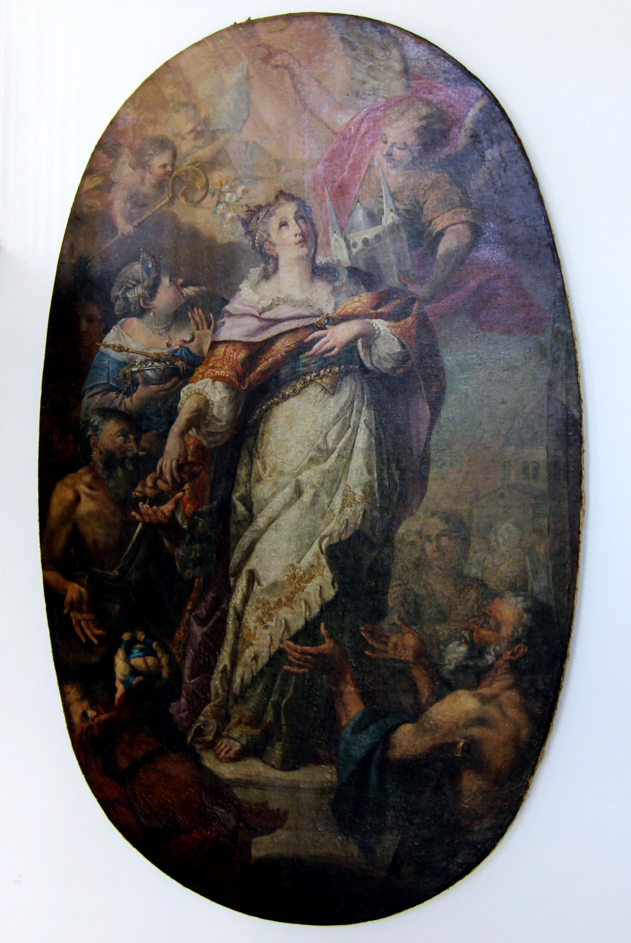 Altarblatt (?) bzw. Gemälde aus der barocken Hildegardkapelle in Kempten, die 1804 abgebrochen wurde.